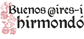 Az Argentínai Magyar Közösség havi elektronikus hírlevele. Publicación mensual de la Colonia Húngara en la Argentina.